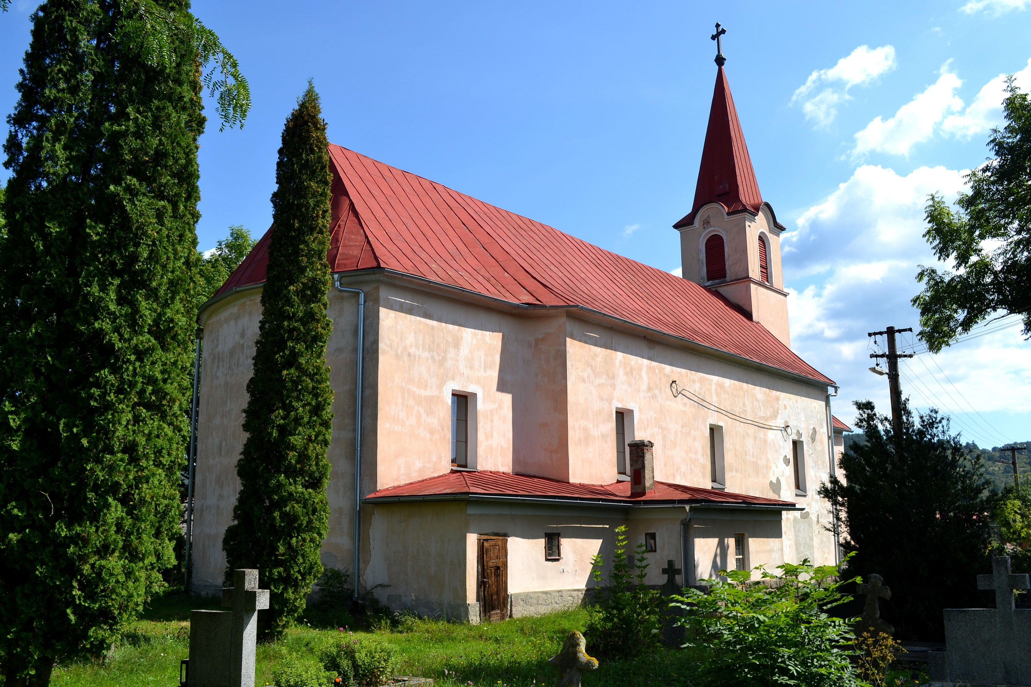 Jabloňovce (okr. Levice), Kostol Všetkých svätých